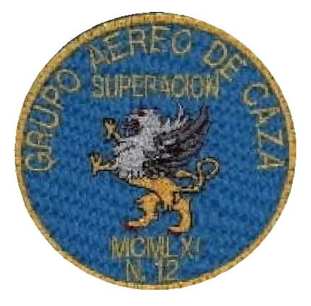 Parche de Grupos de Combate Nº12 asignadado a la Base Aérea Teniente Vicente Landaeta Gil, localizada en la ciudad de Barquisimeto, estado Lara - Venezuela.